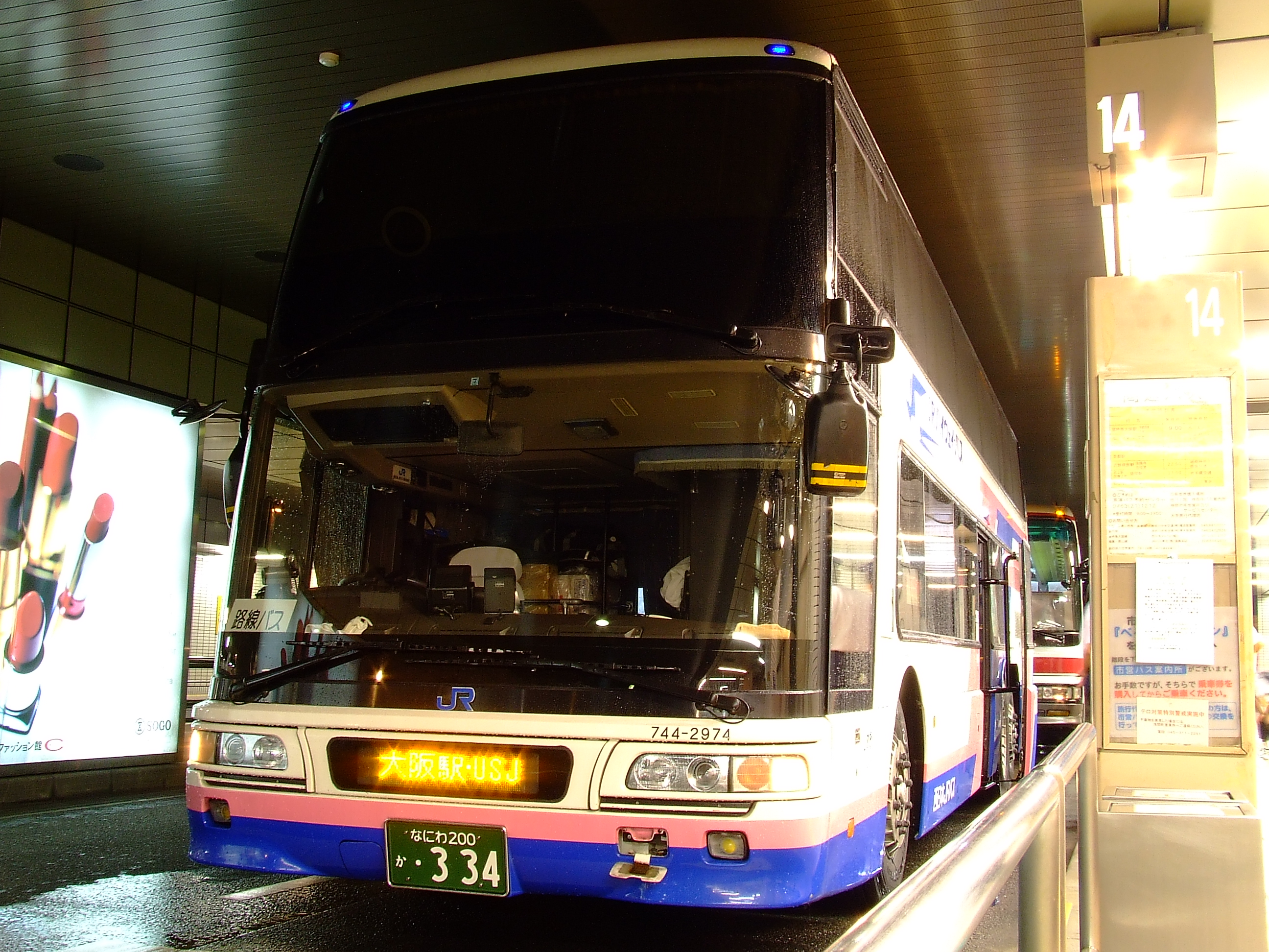 西日本ジェイアールバスの高速バス「ハーバーライト大阪号」 横浜駅東口にて